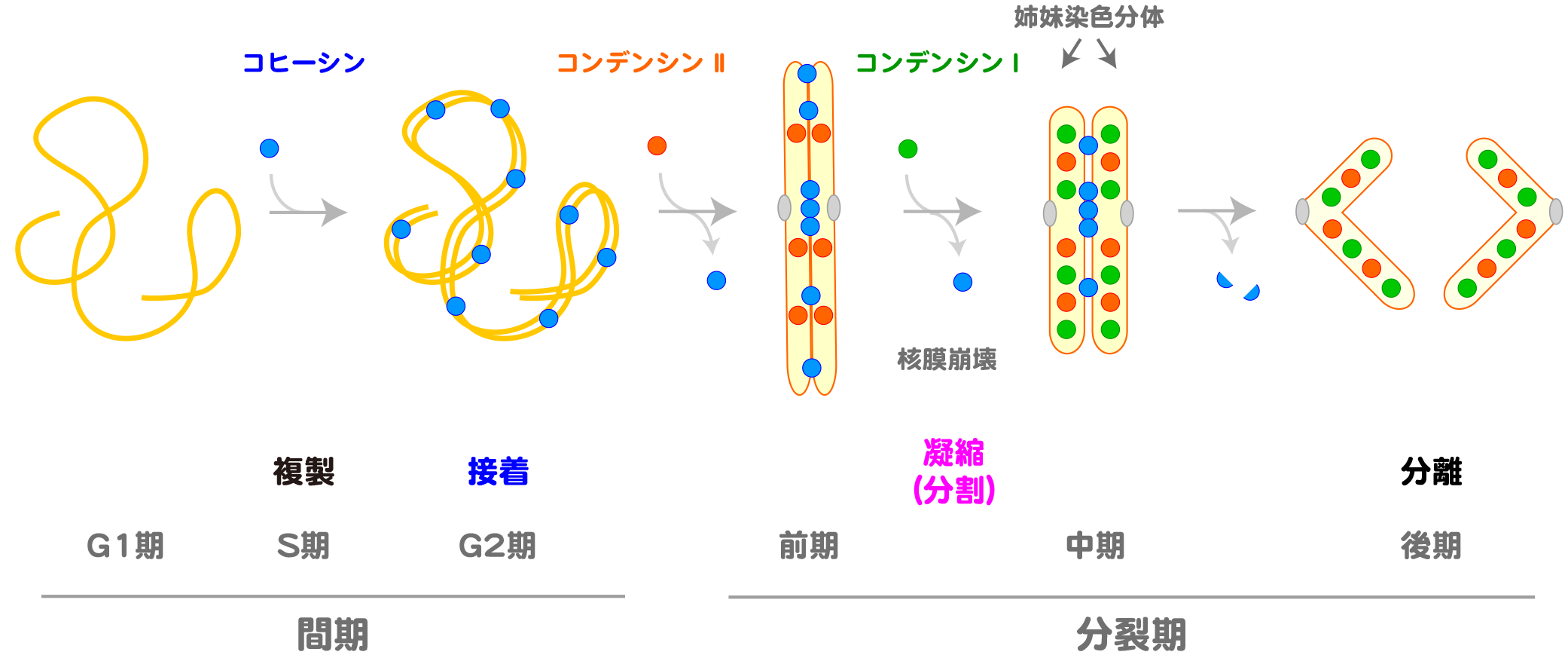 体細胞分裂における染色体サイクル（２）